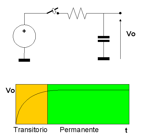 Transitorio